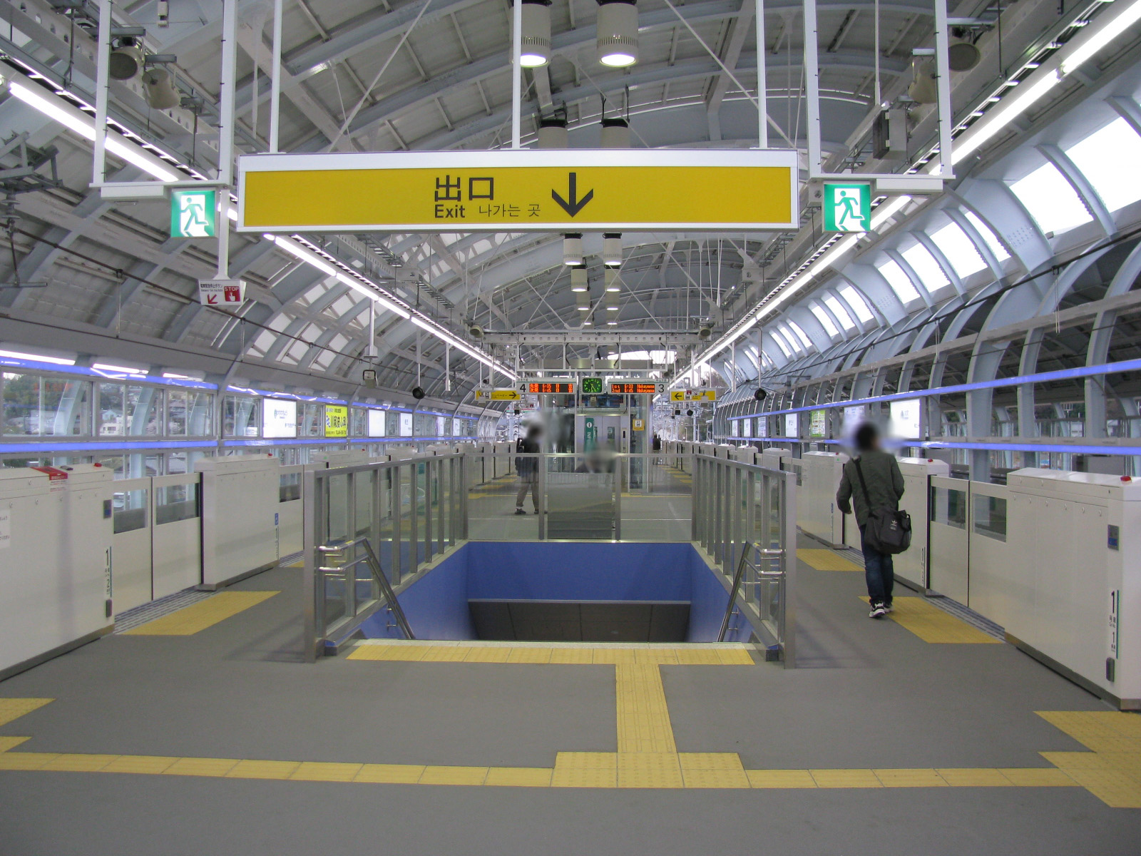 横浜市営地下鉄グリーンライン川和町駅